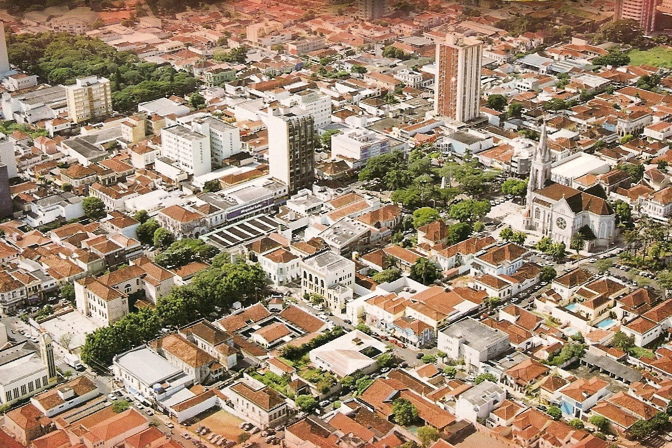 Vista parcial da área central de Jaú